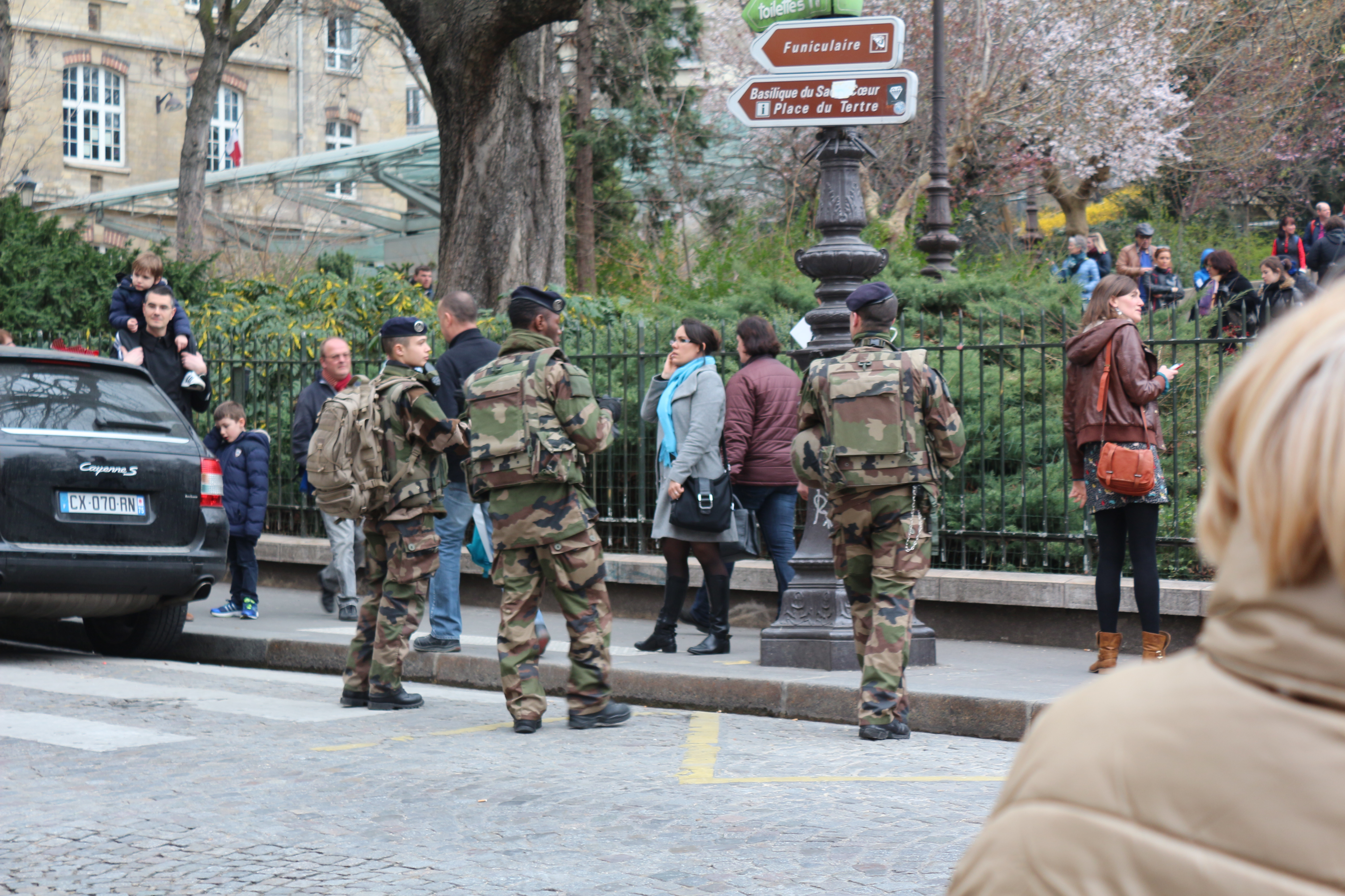 Verstärkte Sicherheitsmaßnahmen nach dem Anschlag auf Charlie Hebdo (vor allem im Umkreis um die Pariser Sehenswürdigkeiten). Drei Soldaten der Armée de Terre patroullieren am Vorplatz des Sacré-Cœur de Montmartre.